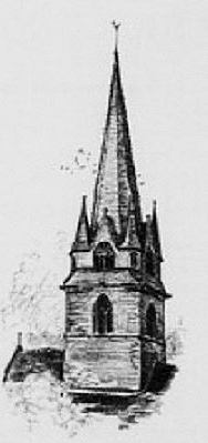 Albert Robida : Le clocher de Rosporden (lithographie parue dans "La vieille France", tome "Bretagne", livre publié en 1900)